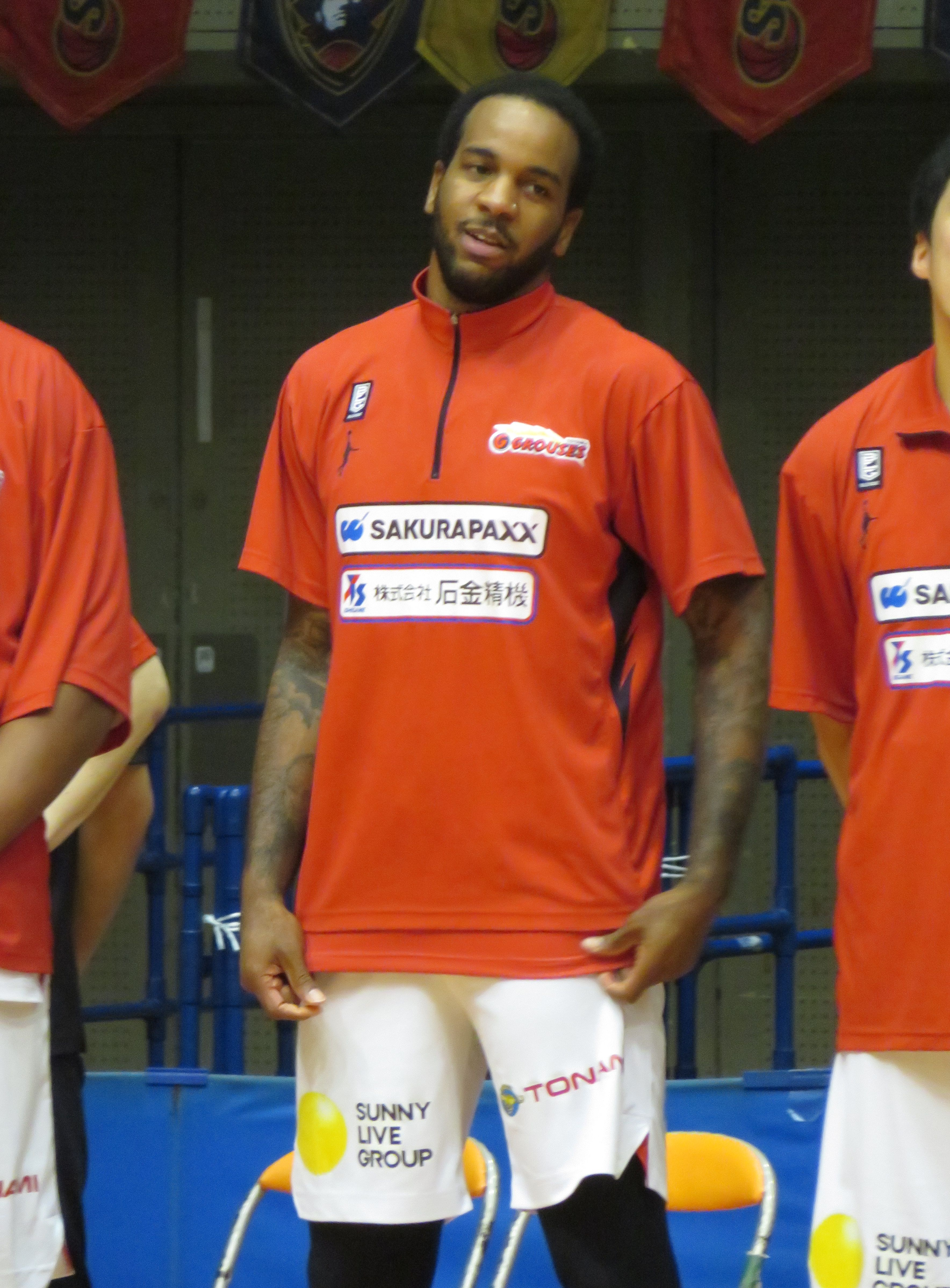 2018年10月18日撮影 2018-19 B1 第3節 横浜-富山 横浜文化体育館にて